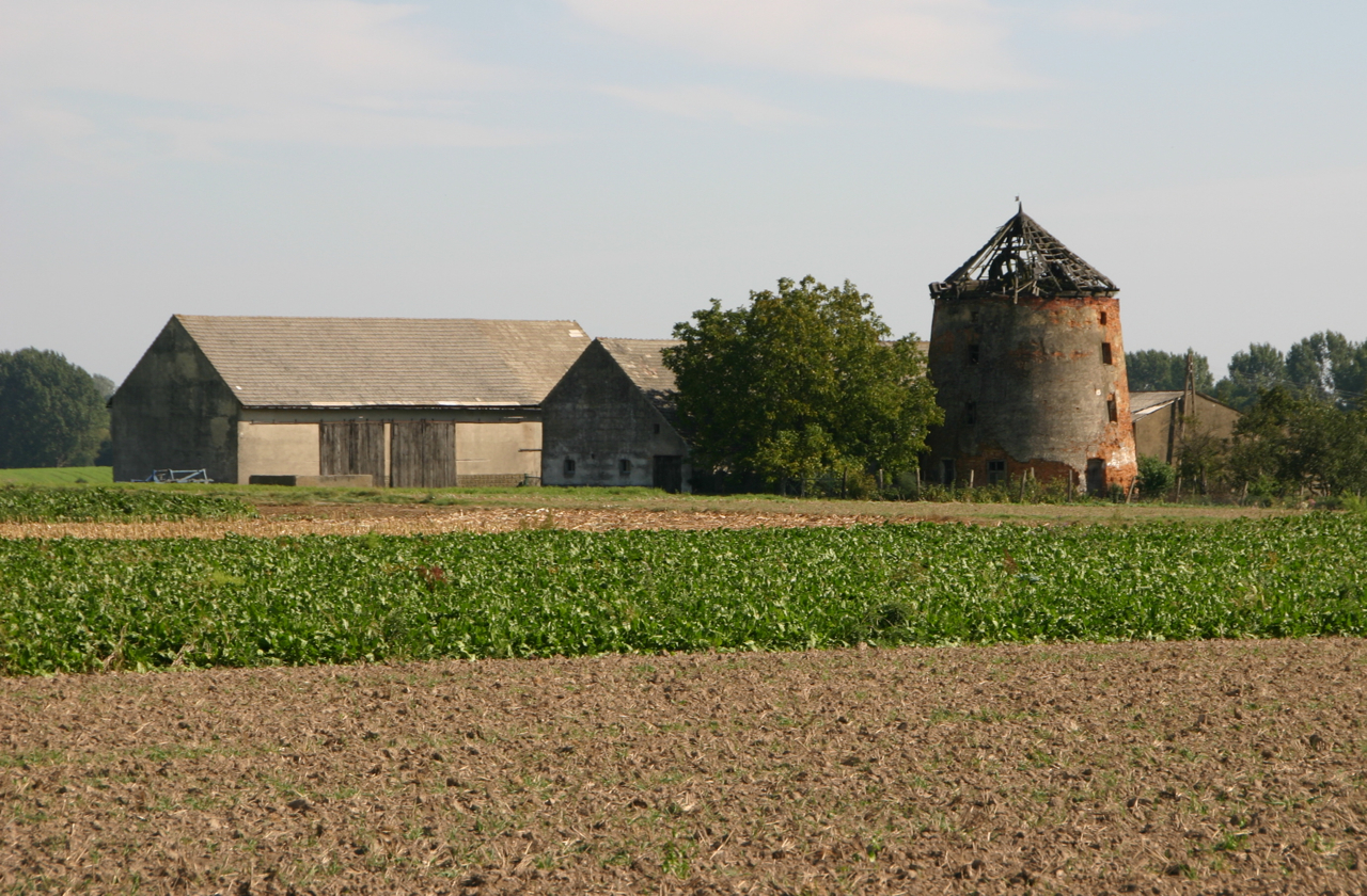 Gostomia (dodatkowa nazwa w j. niem. Simsdorf) – wieś w Polsce położona w województwie opolskim, w powiecie prudnickim, w gminie Biała. Gostomia nr 95, wiatrak holender, XVIII w. (wpisany do rejestru zabytkow).